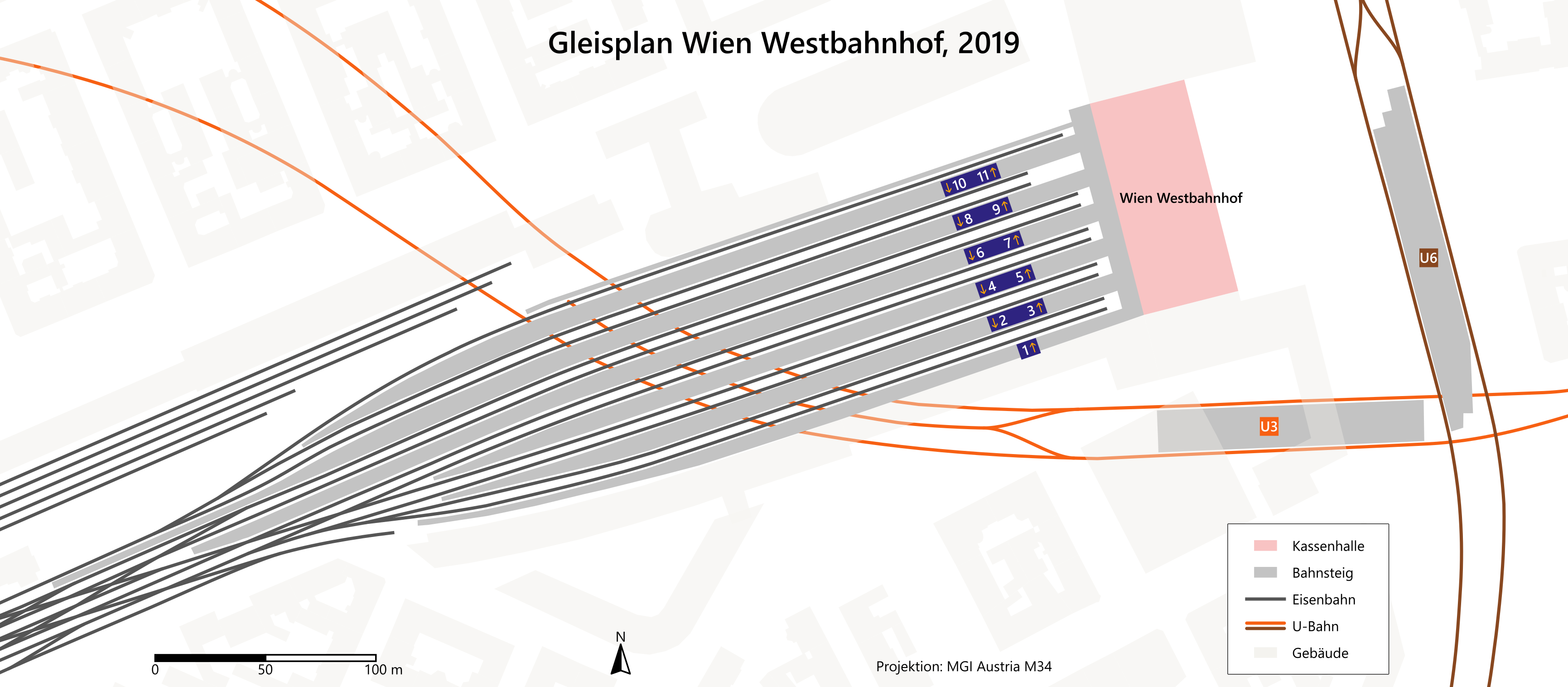 Plan des Wiener Westbahnhofs mit seinen Bahnsteigen sowie den Gleisen der ÖBB und U-Bahn (U3, U6)